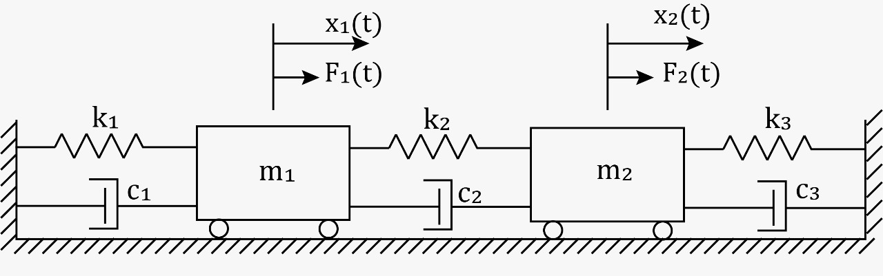 Massas, molas e amortecedores